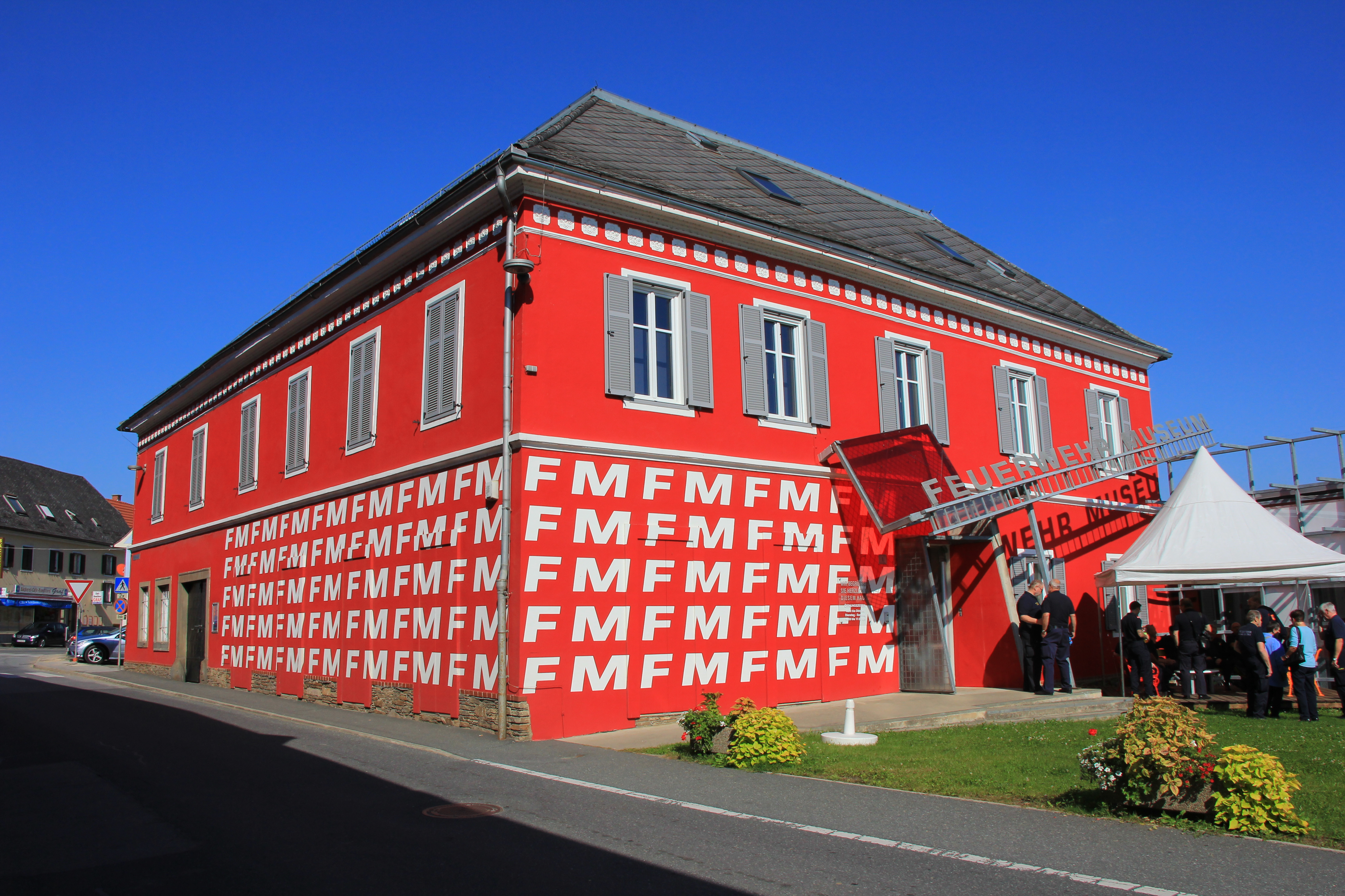 Steirisches Feuerwehrmuseum in Groß Sankt Florian in der Steiermark